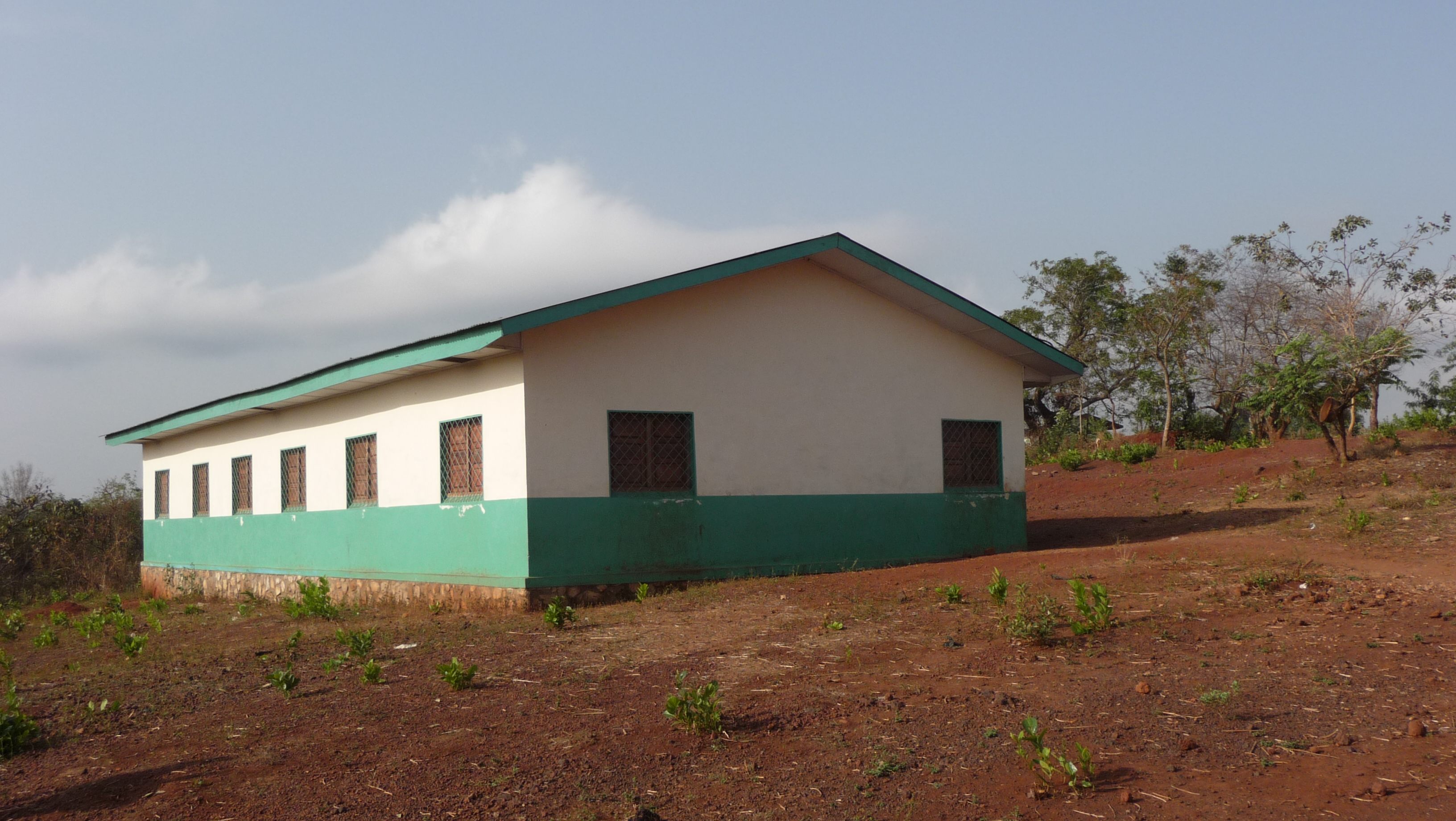 Bloque operatorio de Nzacko, promovido por la diócesis de Bangassou (República Centroafricana)